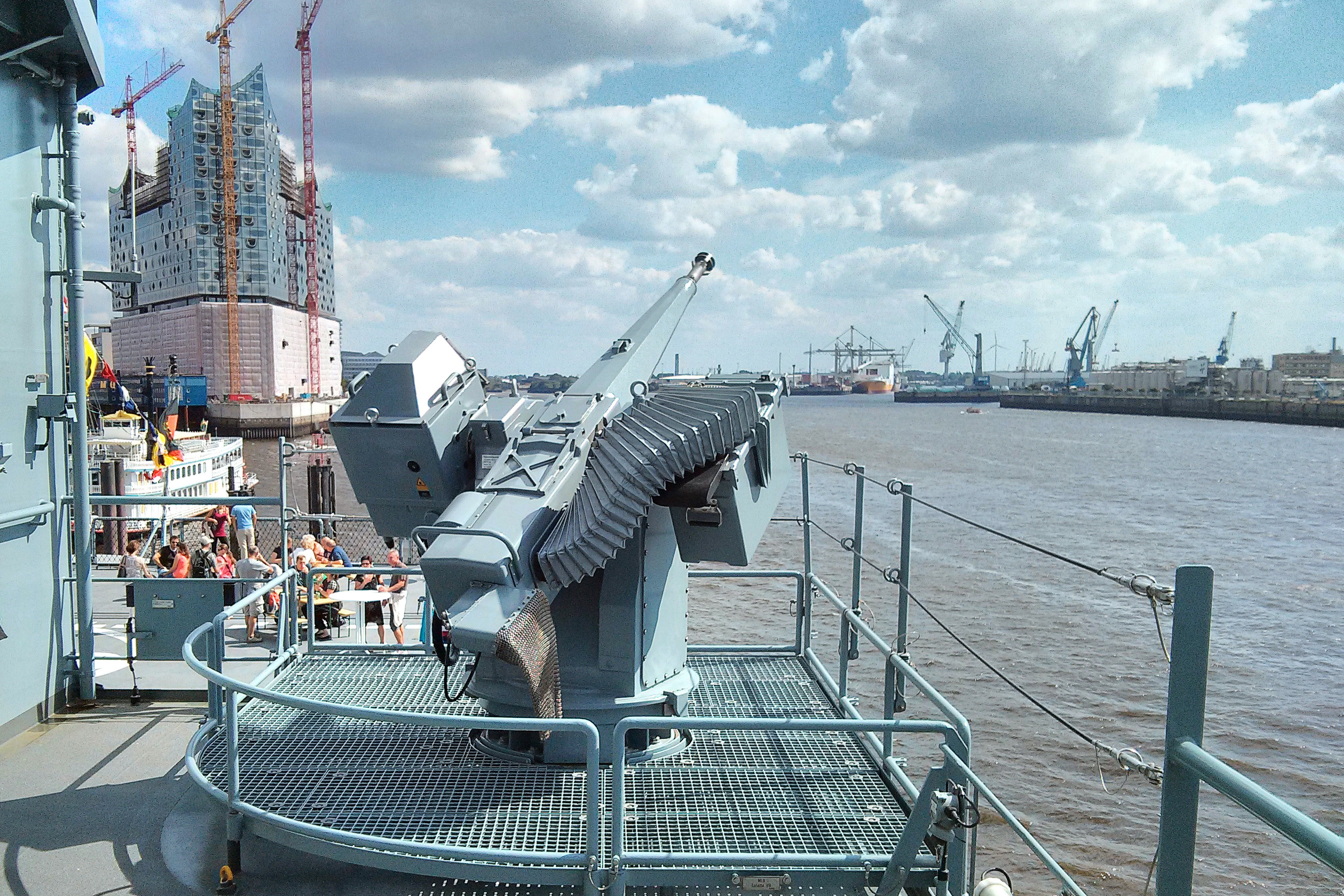 Eines der 27 mm Geschütze des Marine-Versorgungsschiffs Bonn (A1413) am 25. August 2013 im Hamburger Hafen.